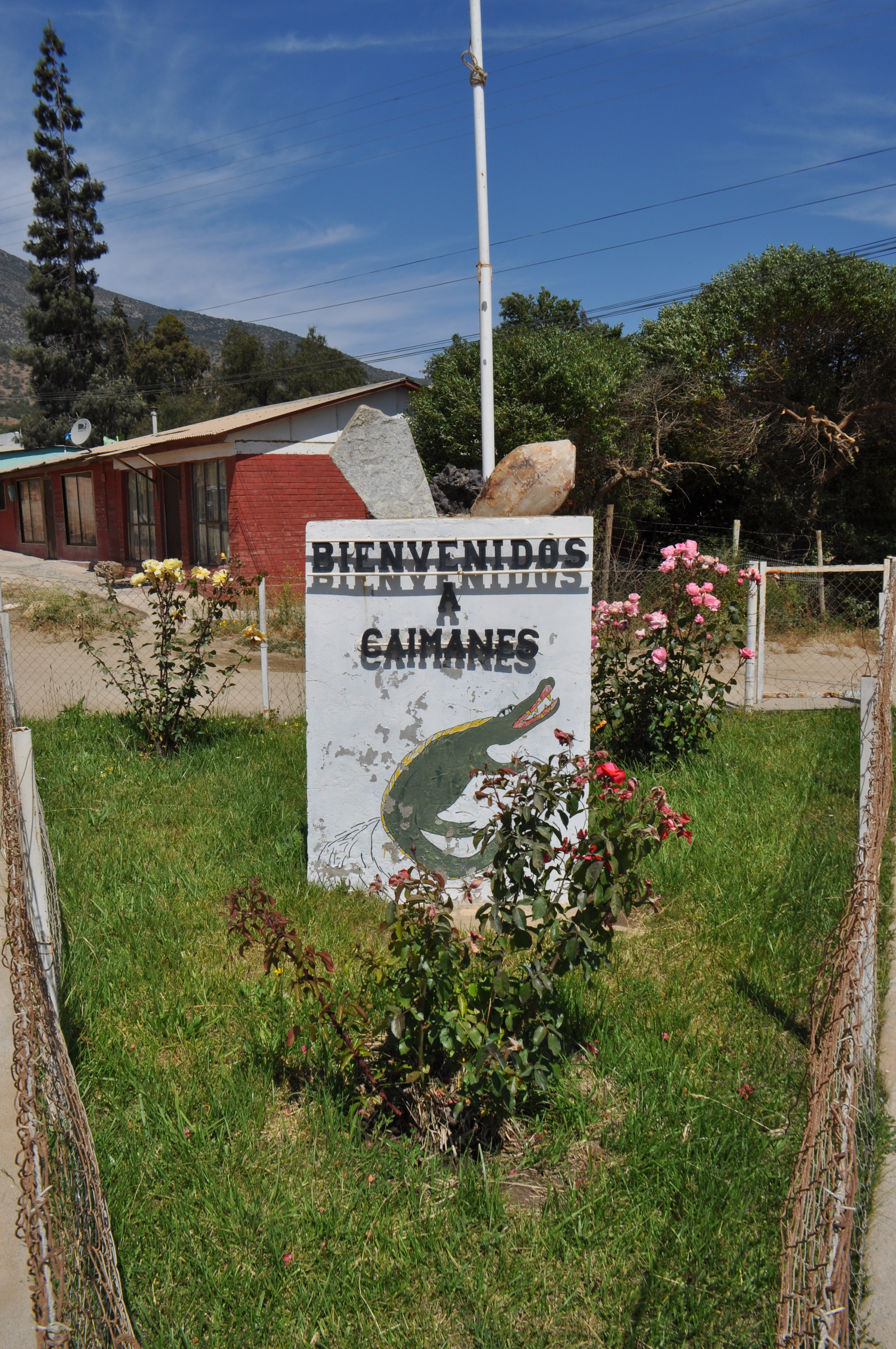 Caimanes, Región de Coquimbo, Chile. Monolito en el cruce central del pueblo. Los minerales representan los bienes naturales que se explotaban a pequeña escala en la localidad, antes de la existecia de grandes empresas mineras en la zona